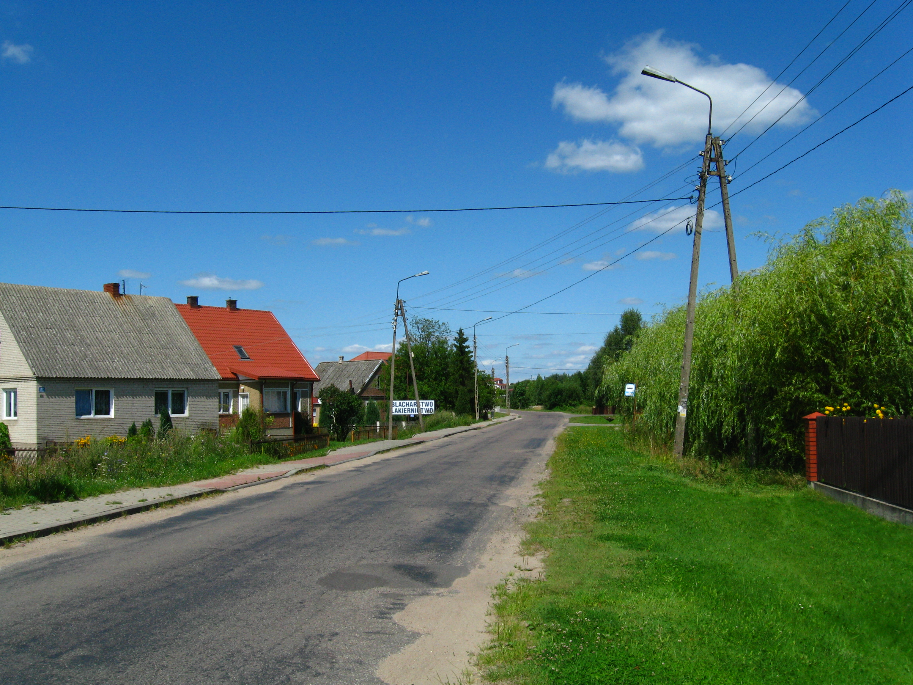 Dobrzyniewo Fabryczne